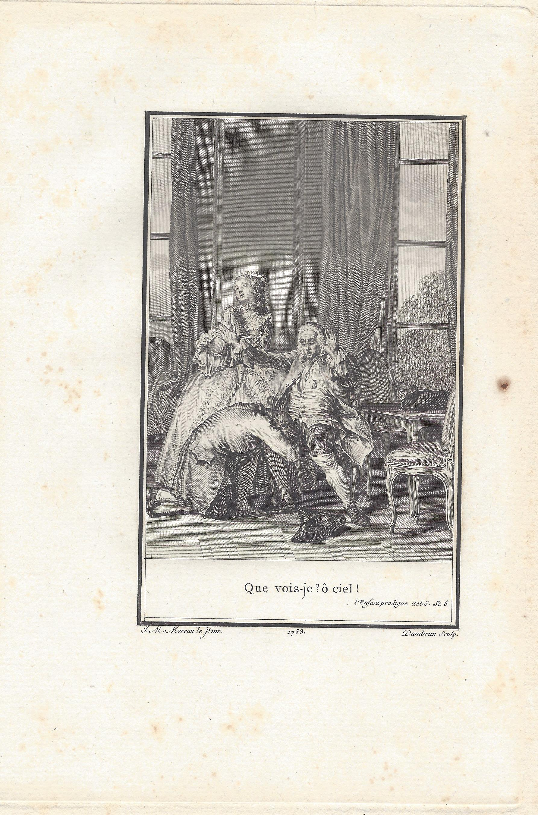 Voltaire: L'Enfant prodigue Akt 5 Szene 6 Kupferstich von Jean Dambrun nach Jean-Michel Moreau